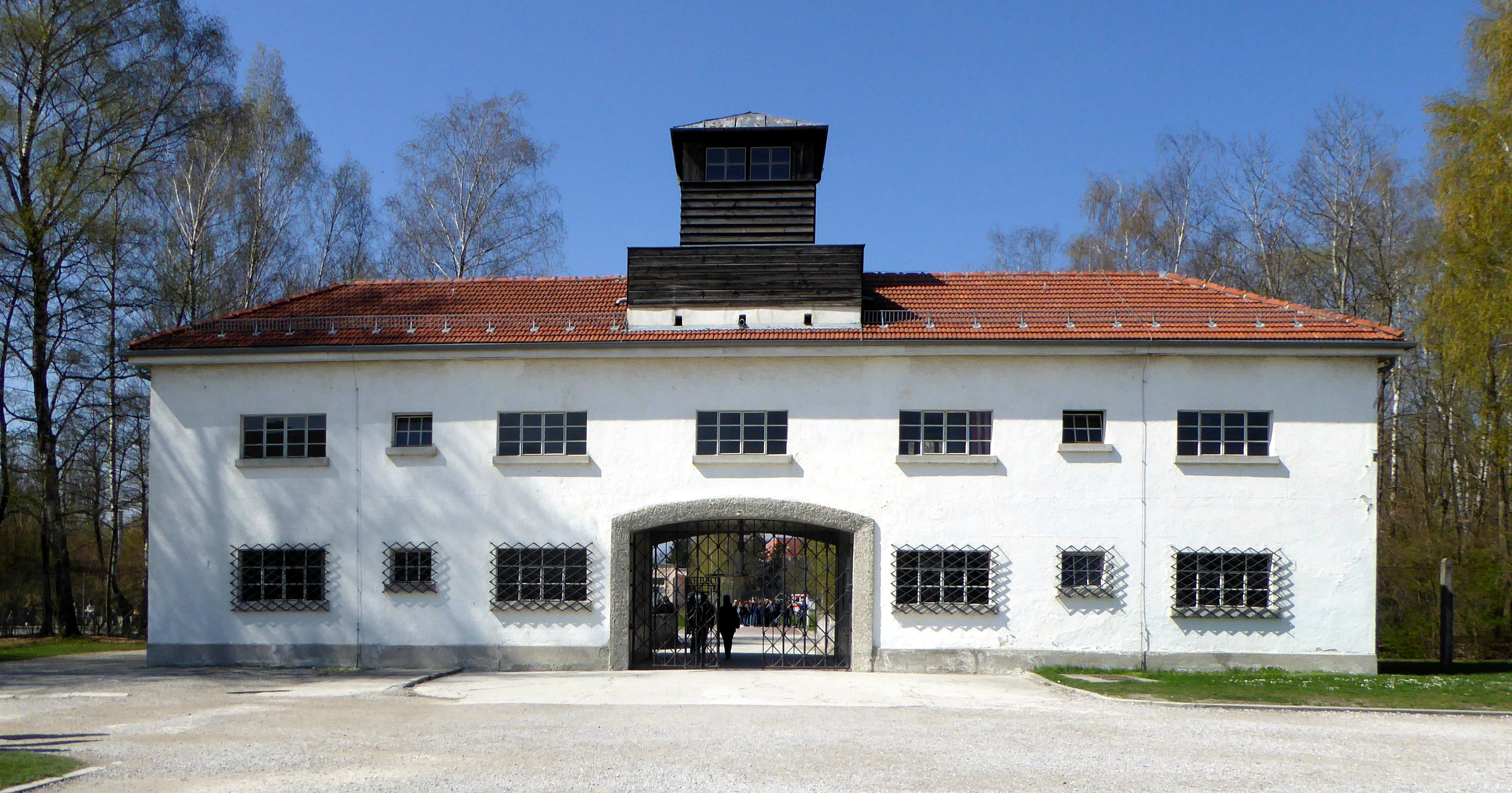 Innenseite des Jourhauses des ehemaligen KZ Dachau.